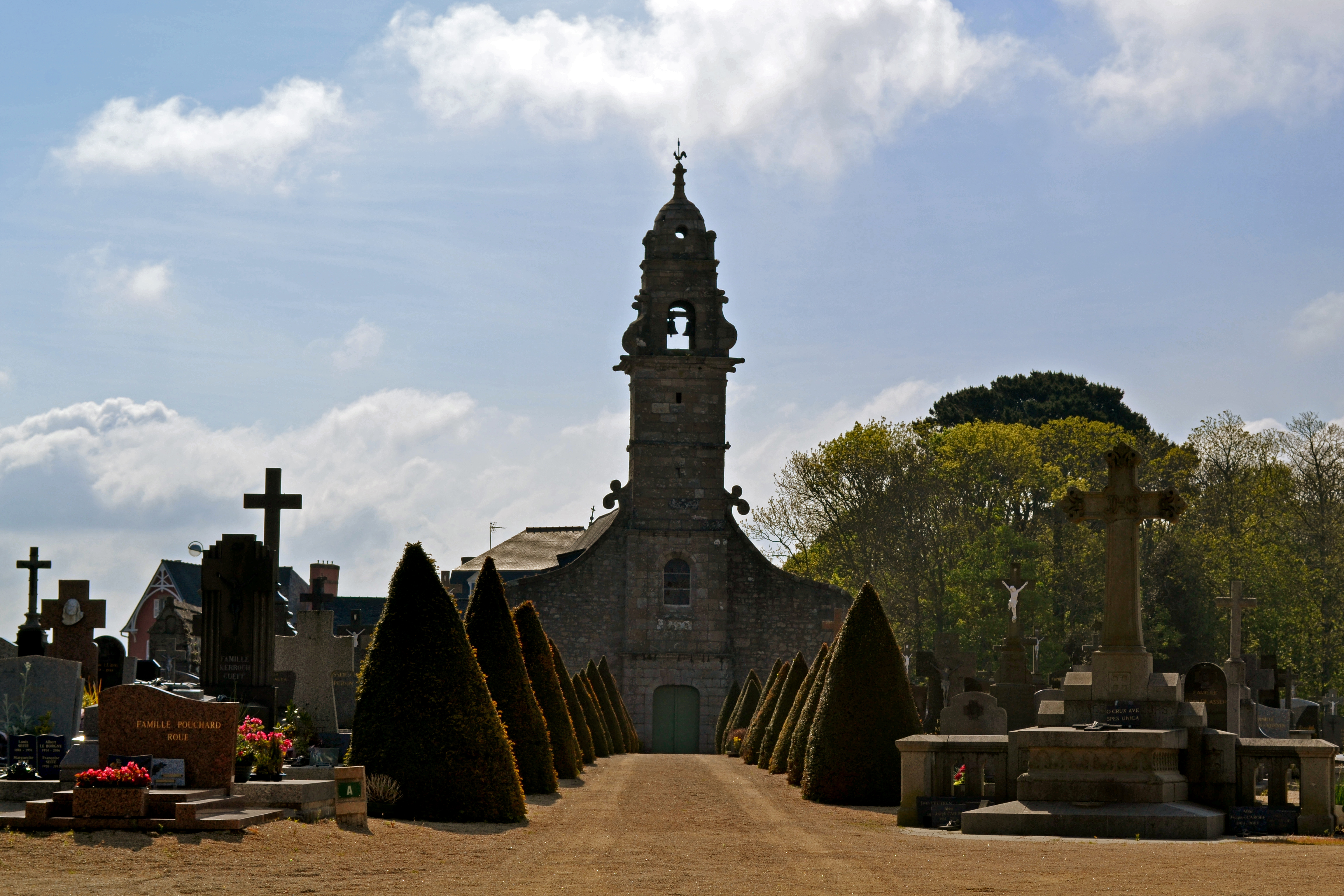 Entrée du cimetière avec en face l'église Saint-Pierre à Saint-Pol-de-Léon (29).